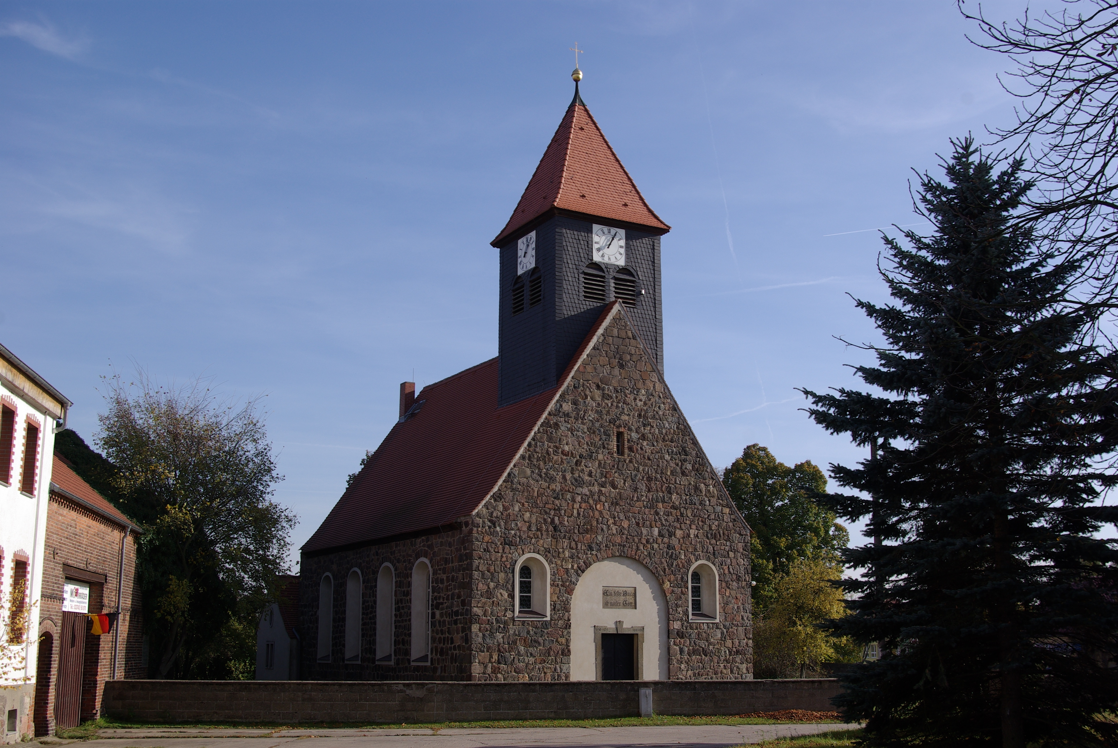 Niedergörsdorf, Ortsteil Blösdorf in Brandenburg. Die Kirche im Dorf steht unter Denkmalschutz.